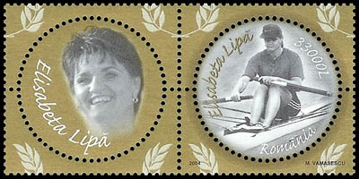 Romania 2004 stamp Elisabeta Lipă